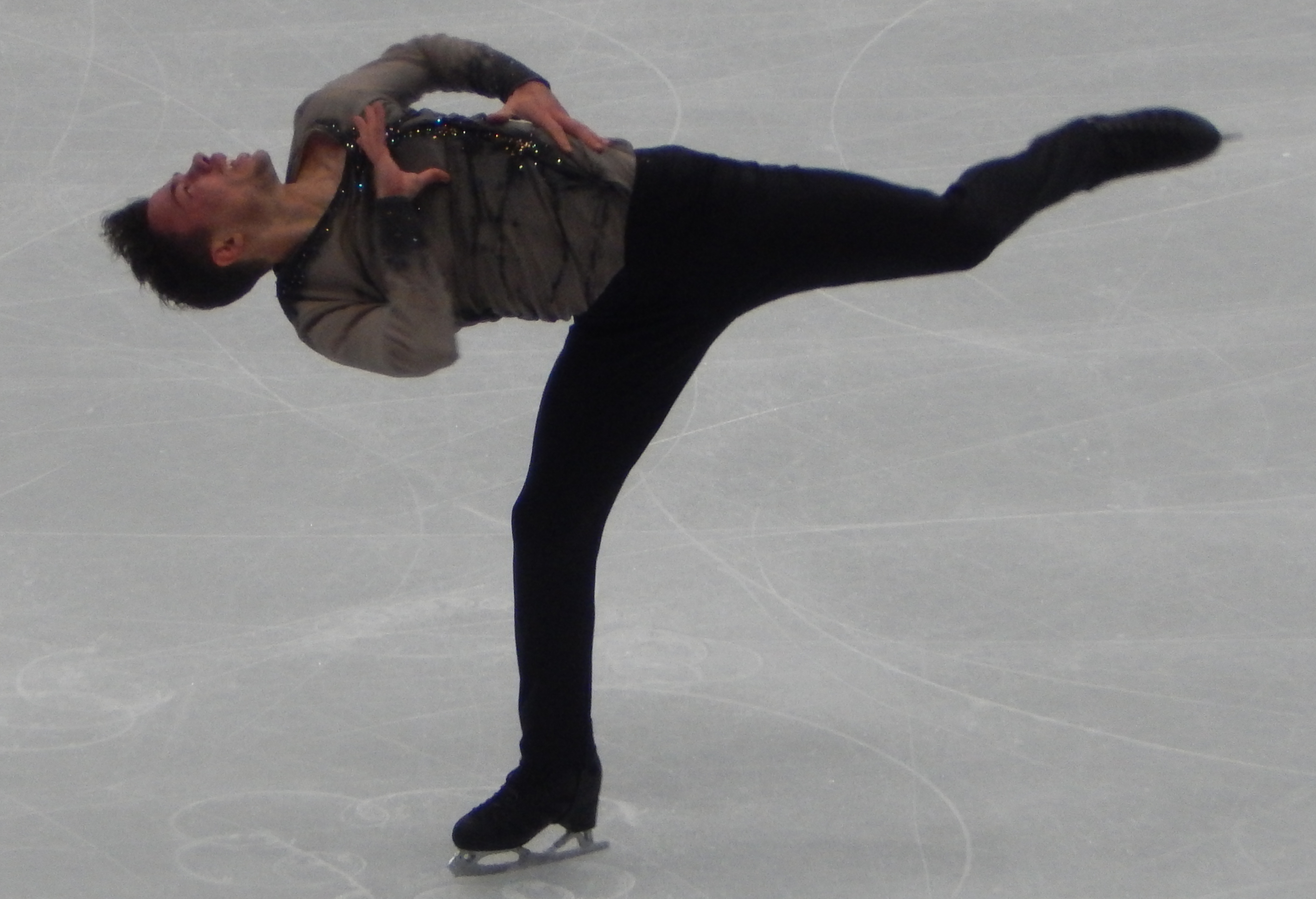 Чемпионат Европы по фигурному катанию 2018 в Москве. Первый день соревнований (17 января). Бельгийский фигурист Йорик Хендрикс